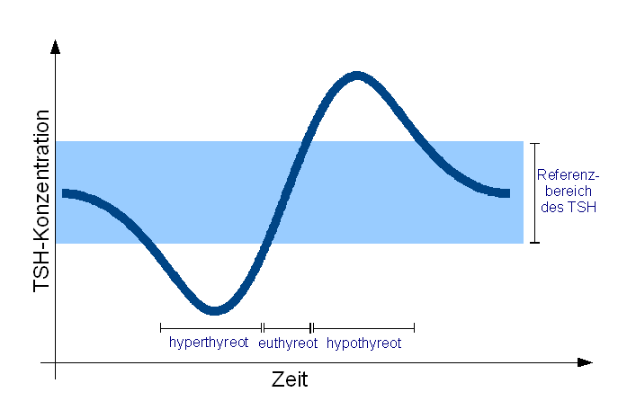 Schematische Darstellung der TSH-Konzentration bei der subakuten granulomatösen Thyreoiditis